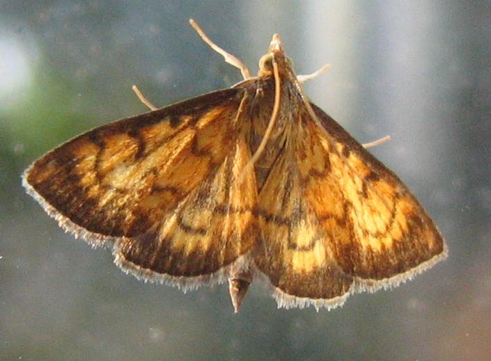 Ecpyrrhorrhoe rubiginalis (Hübner, 1796), Pyraloidea, Lepidoptera, Fundort: Groß Machnow, Brandenburg, Ortsrand